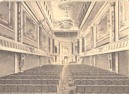 Salle Érard Salle de concert